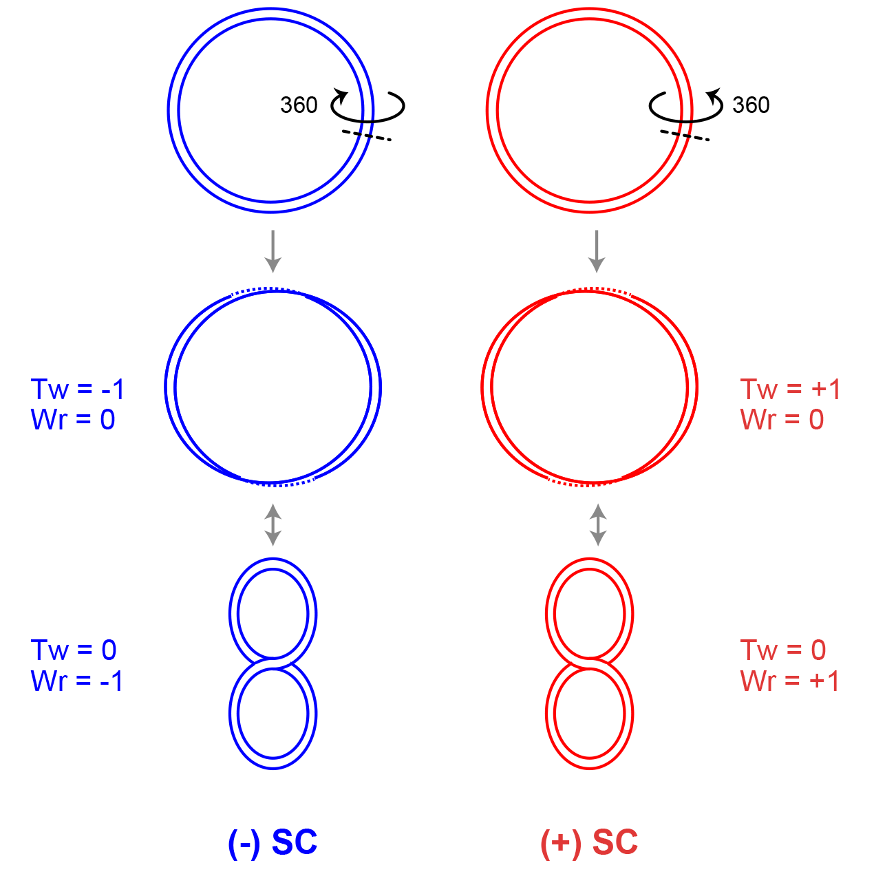 負と正の超らせん